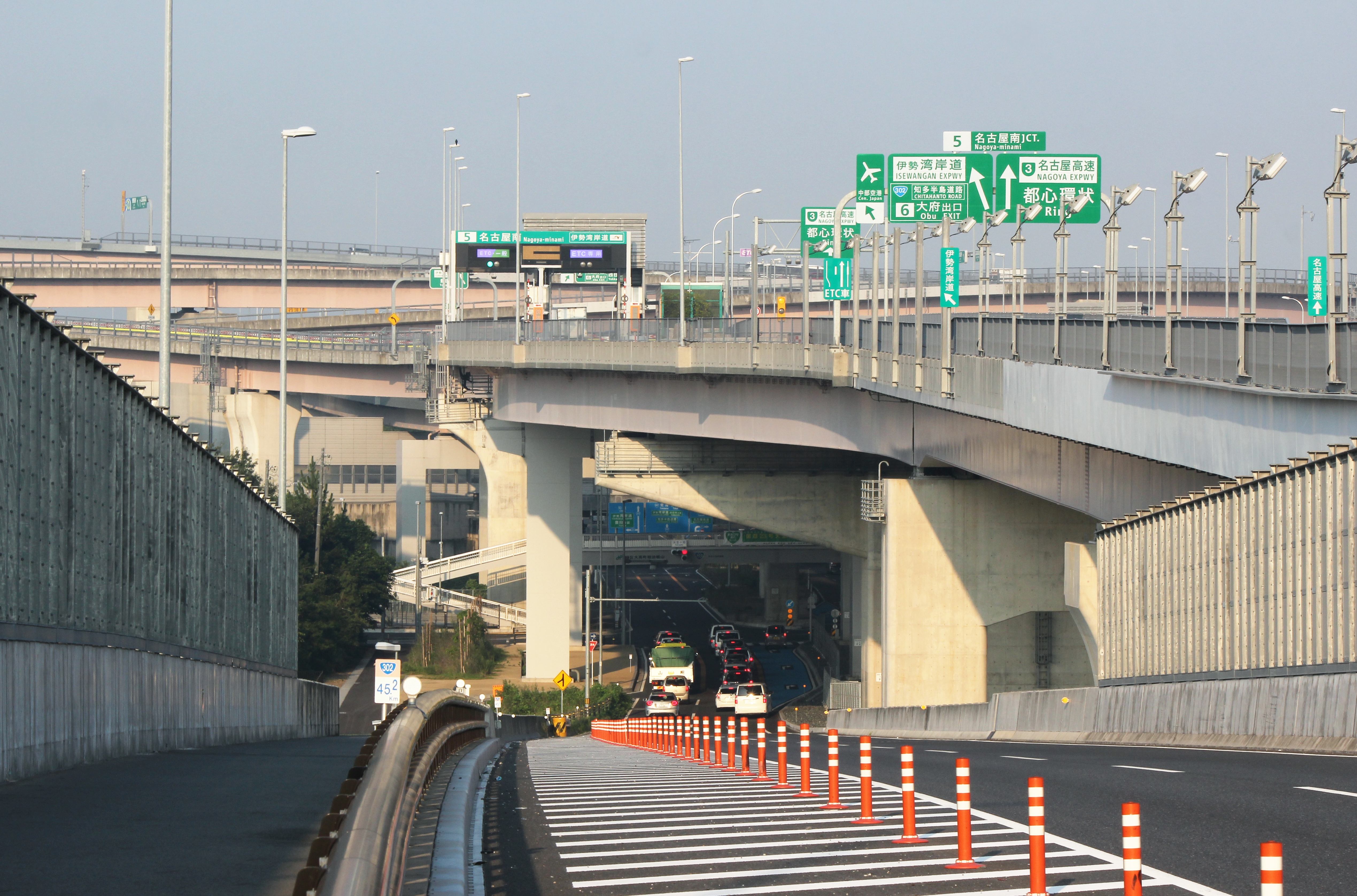 名古屋南ジャンクション